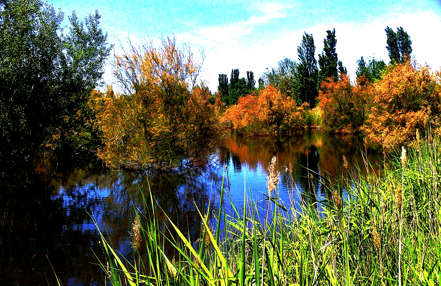 Humedal de La Guindalera, Real Sitio de San Fernando.